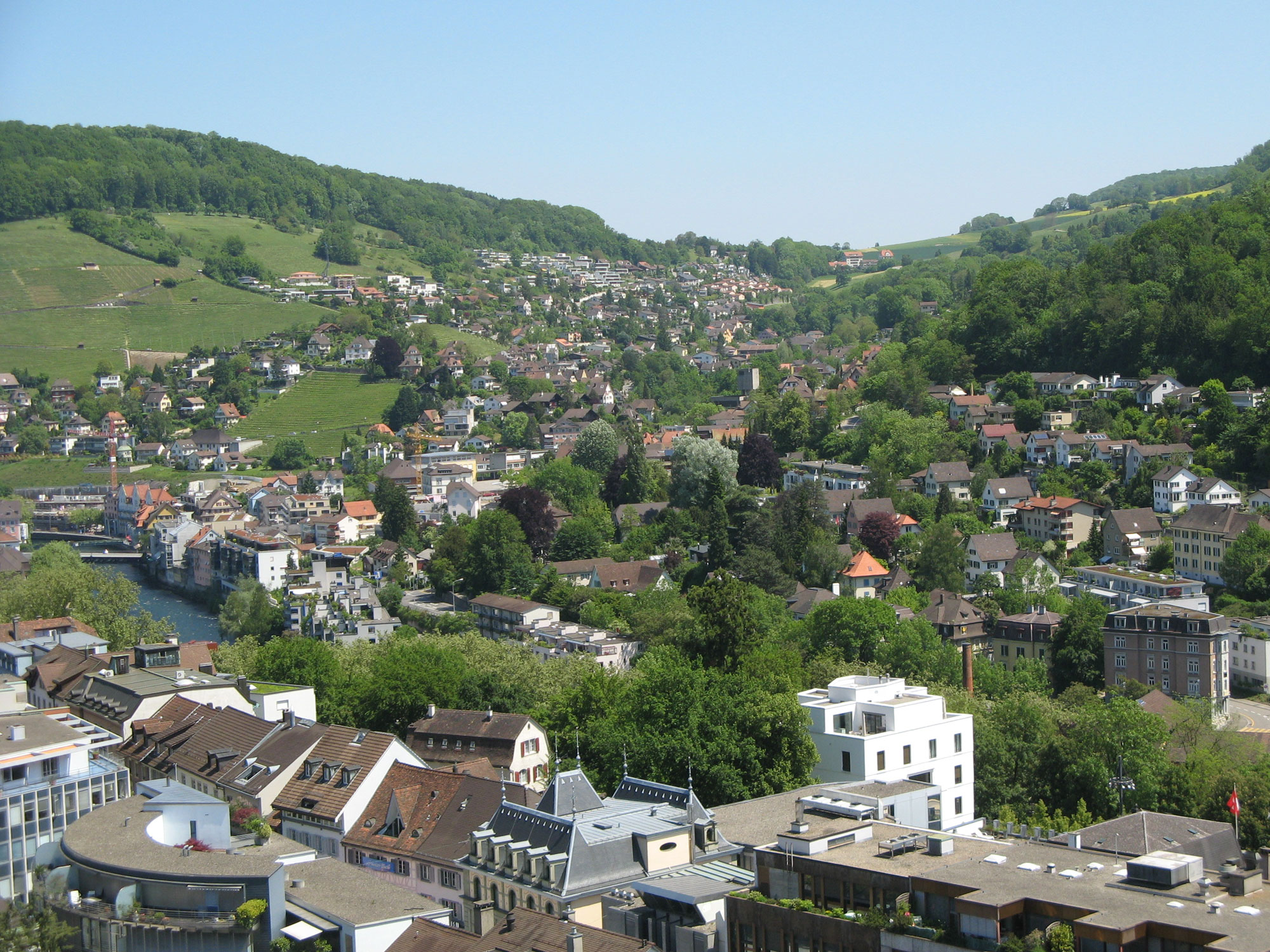 Ennetbaden, von der Ruine Stein aus gesehen